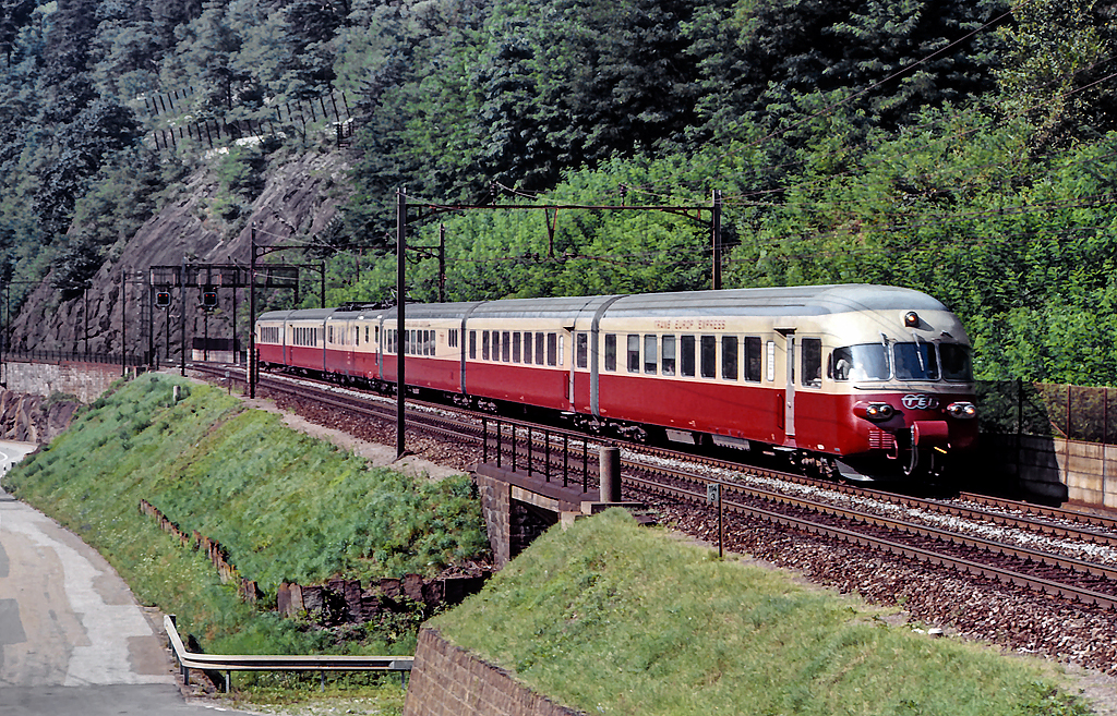 Elettrotreno FFS RAe 1051 in transito nei pressi di Lavorgo come TEE 57 "Gottardo" (Zürich HB - Milano C.le)